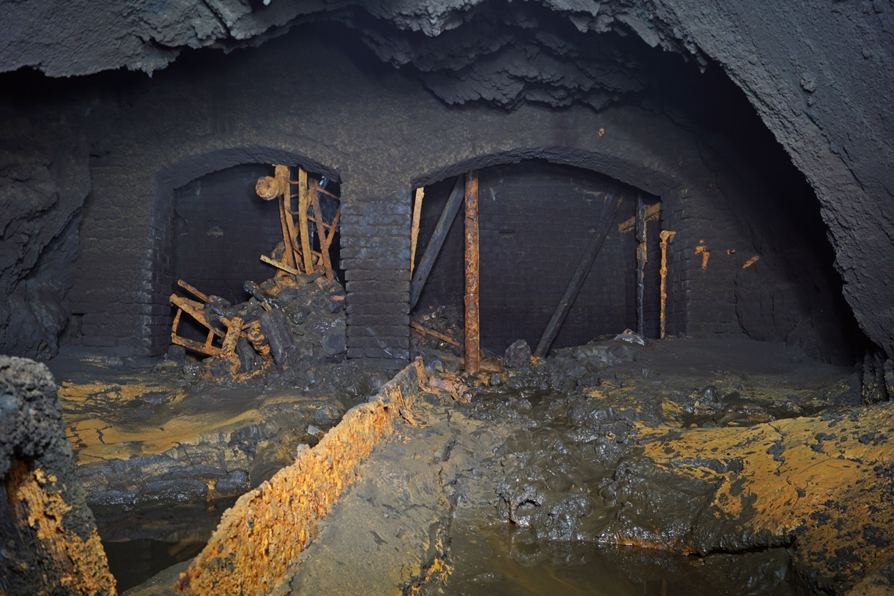 Schacht Ecke